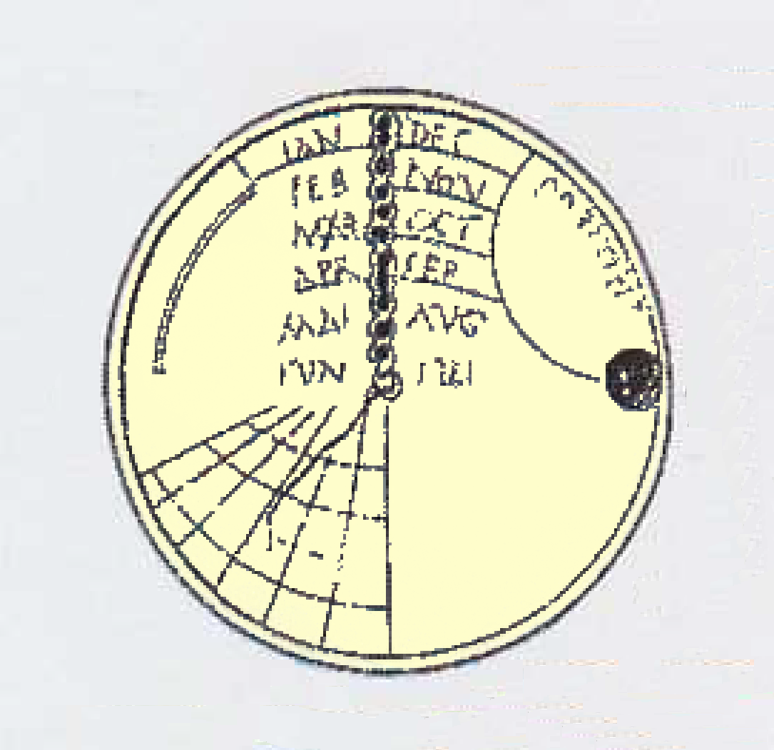 Cadran disque de Mayence, détail des mois, d'après dessin.